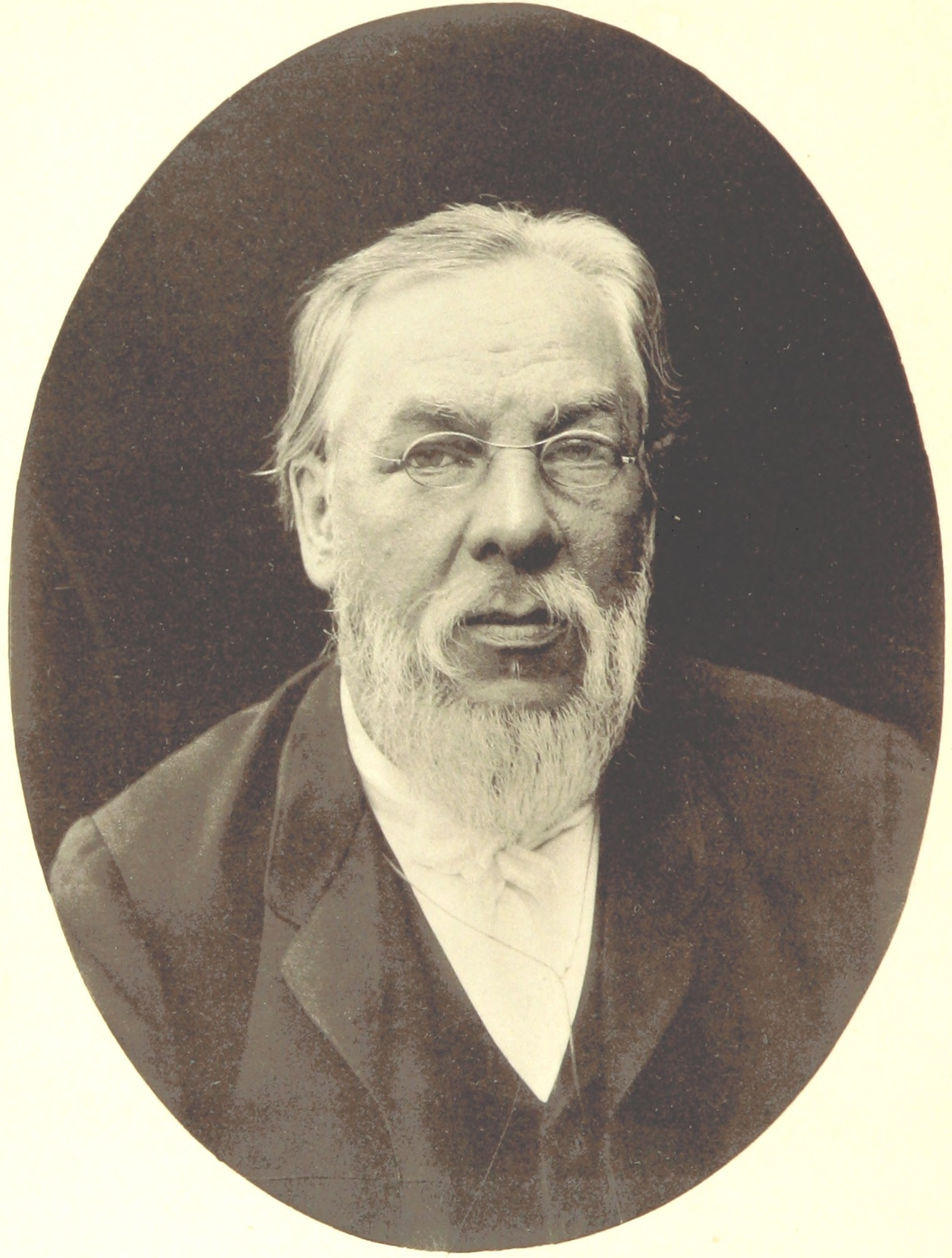 Боткин, Сергей Петрович